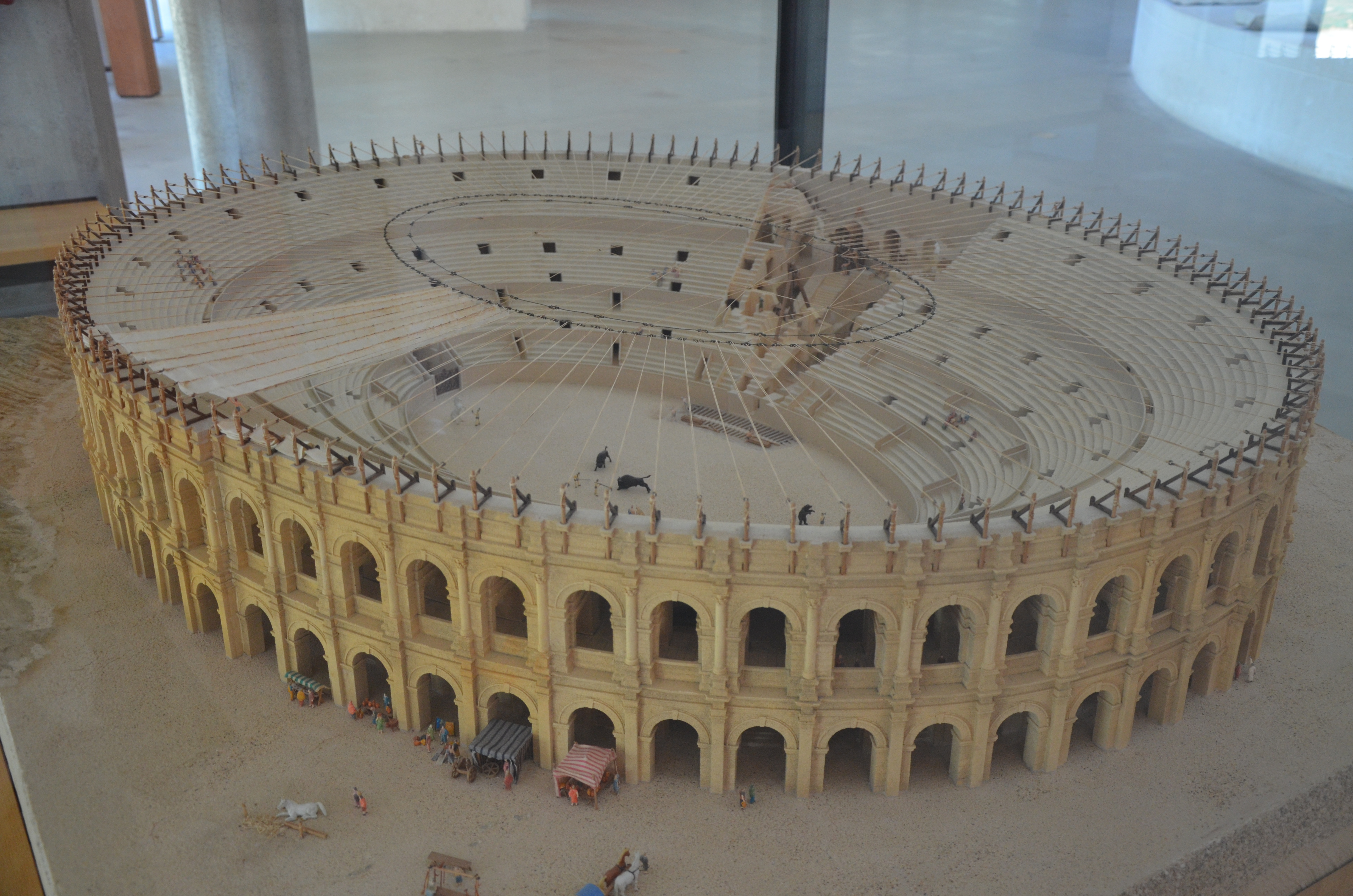 Musée de l'Arles antique, Arles, France